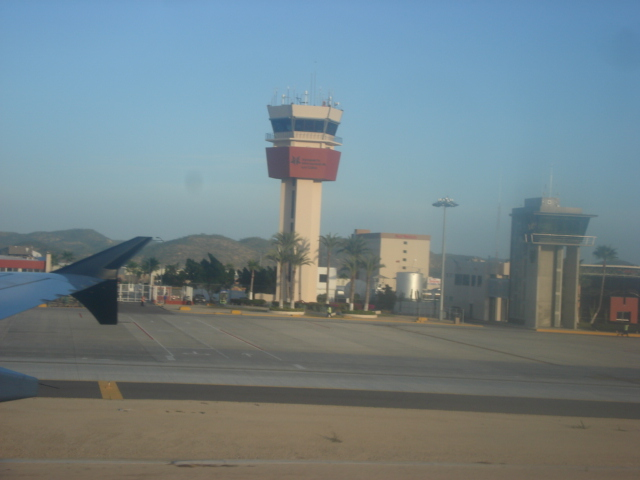 Zona aire del Aeropuerto de San José del Cabo, BCS.